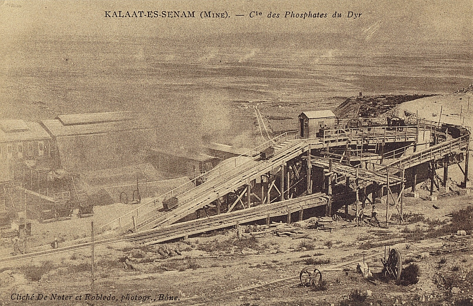 Mine de phosphates de Kalaar Senam